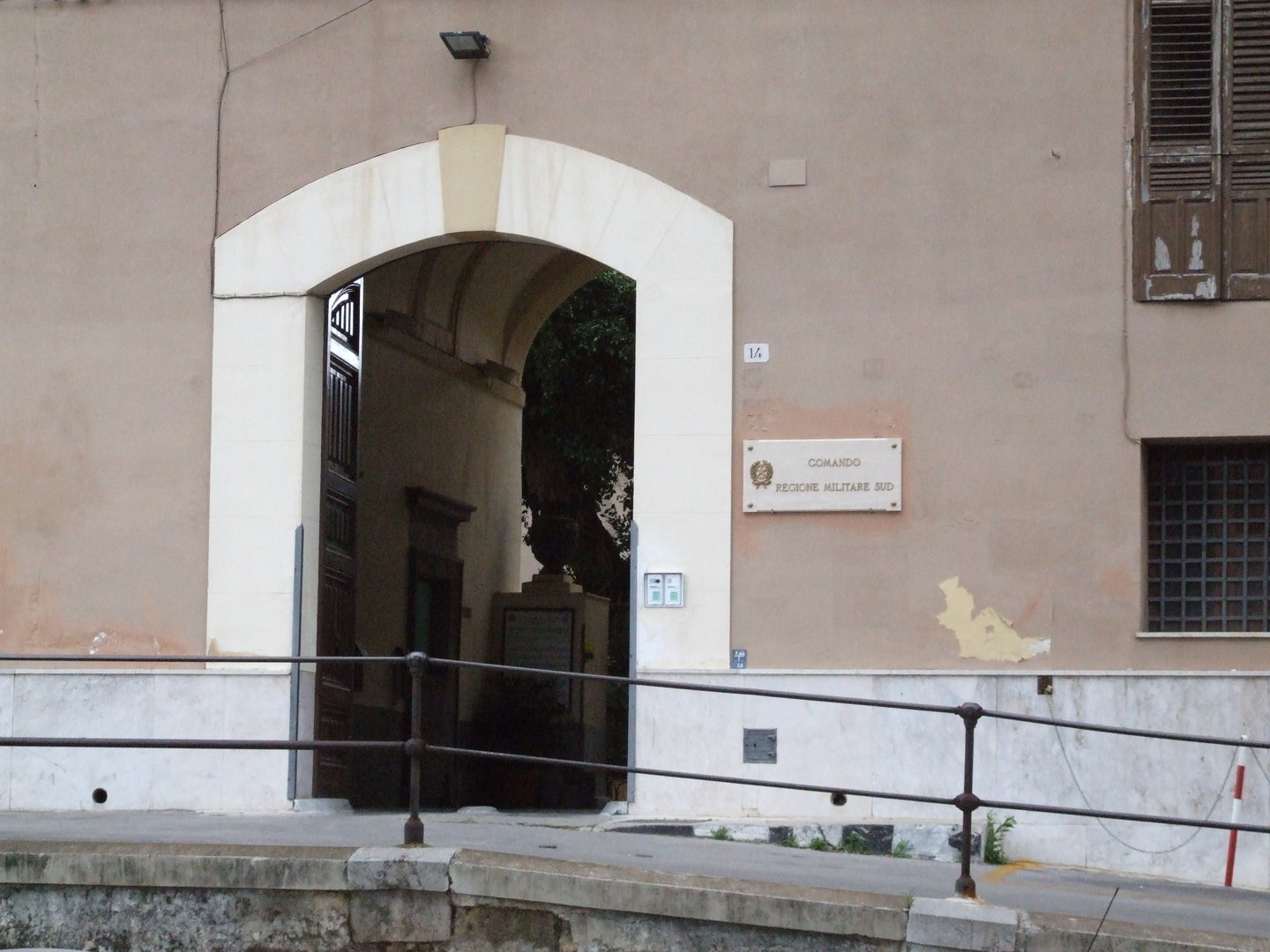 Comando regione militare Sud, Palermo